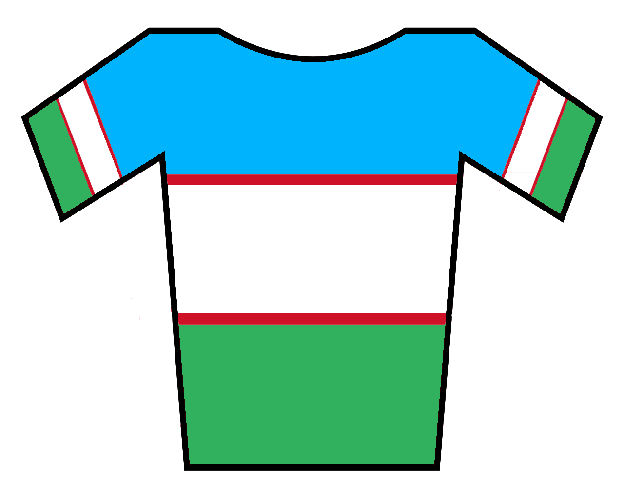 Maillot de Uzbekistán